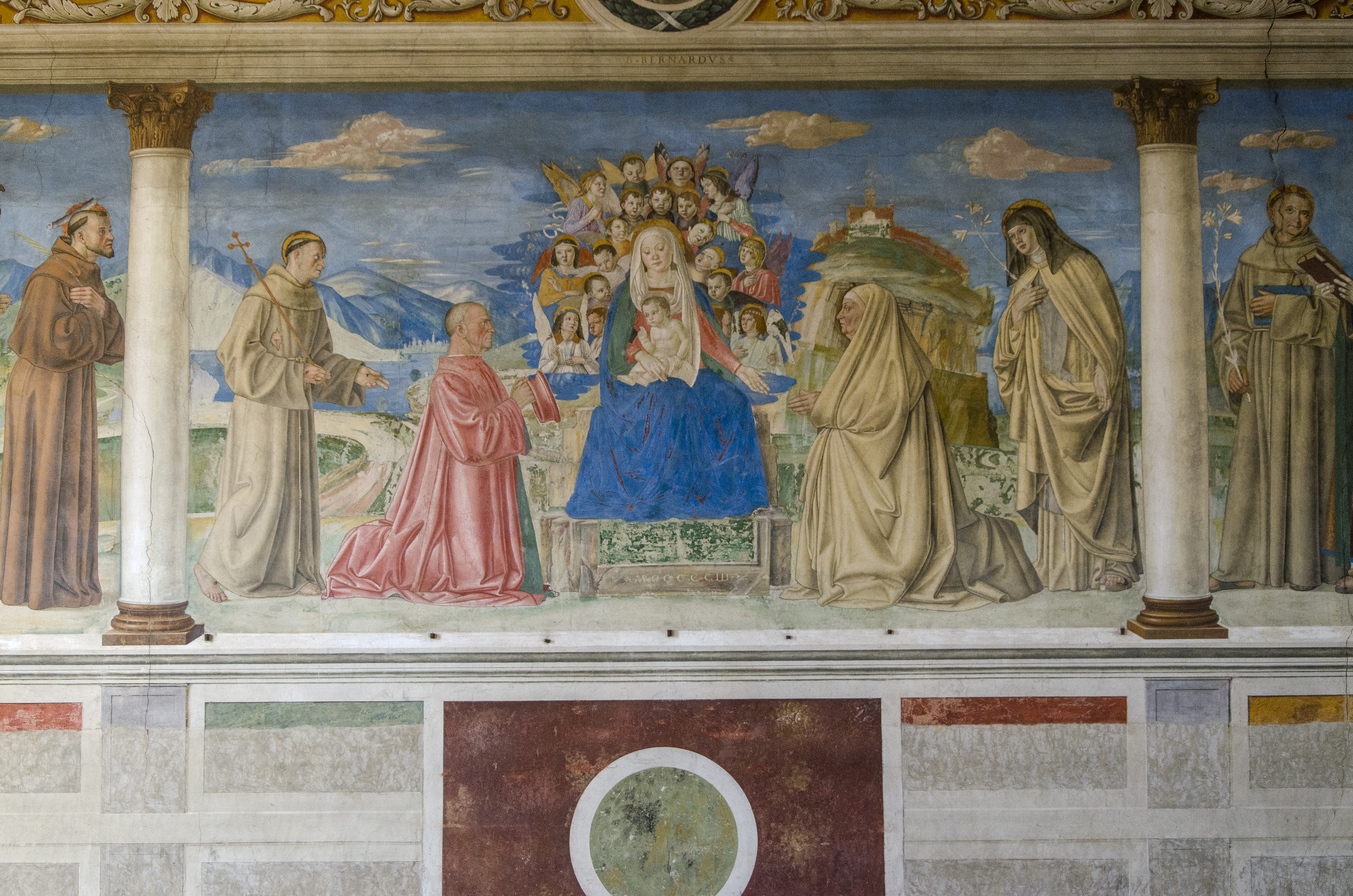 Chiesa di San Bernardino a Verona